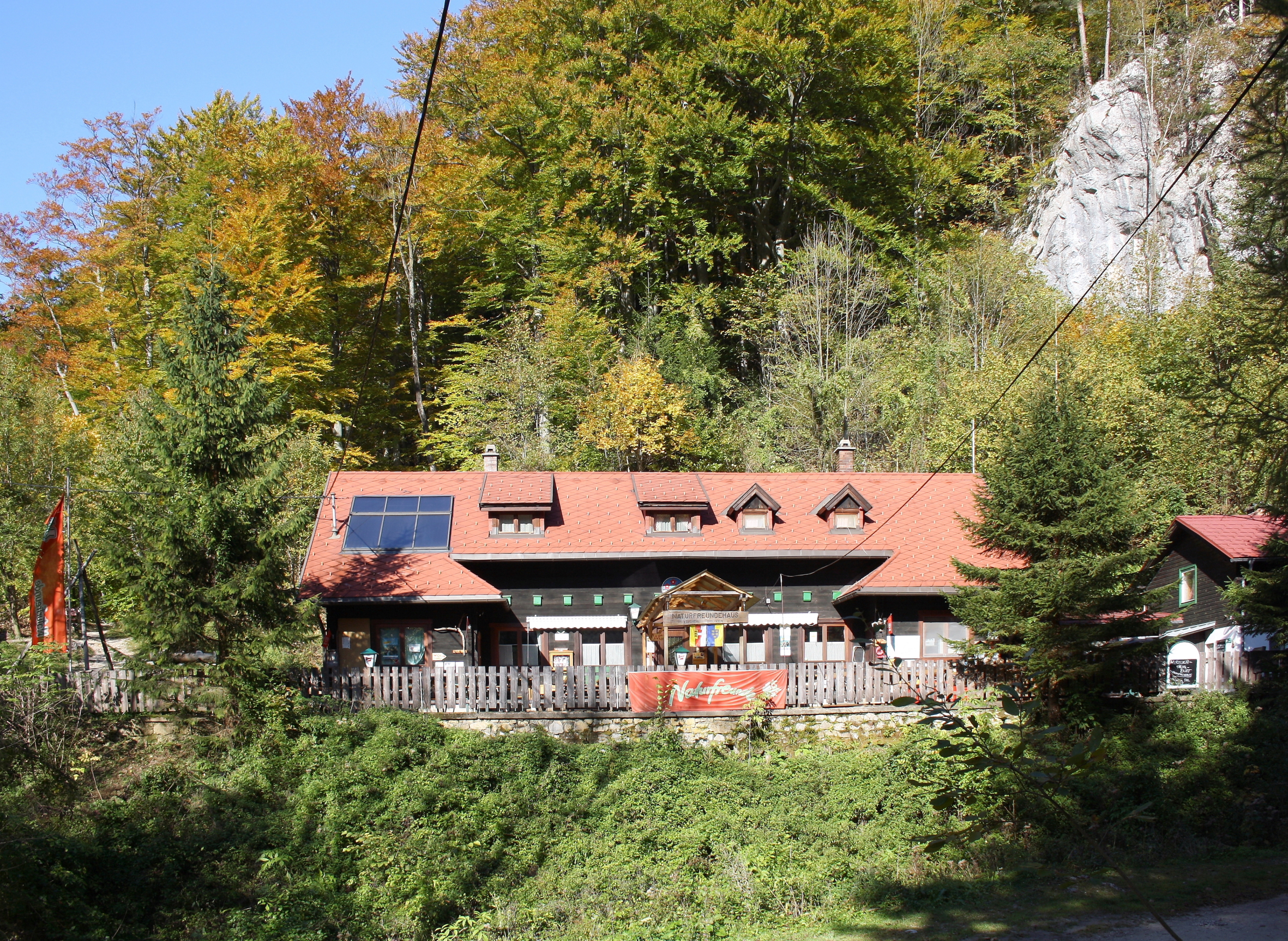 Das Weichtalhaus im Höllental zwischen dem Raxmassiv und dem Schneeberg.